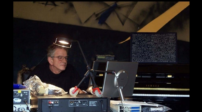 René-Louis Baron (inventeur de Medal-Composer), dans son bureau